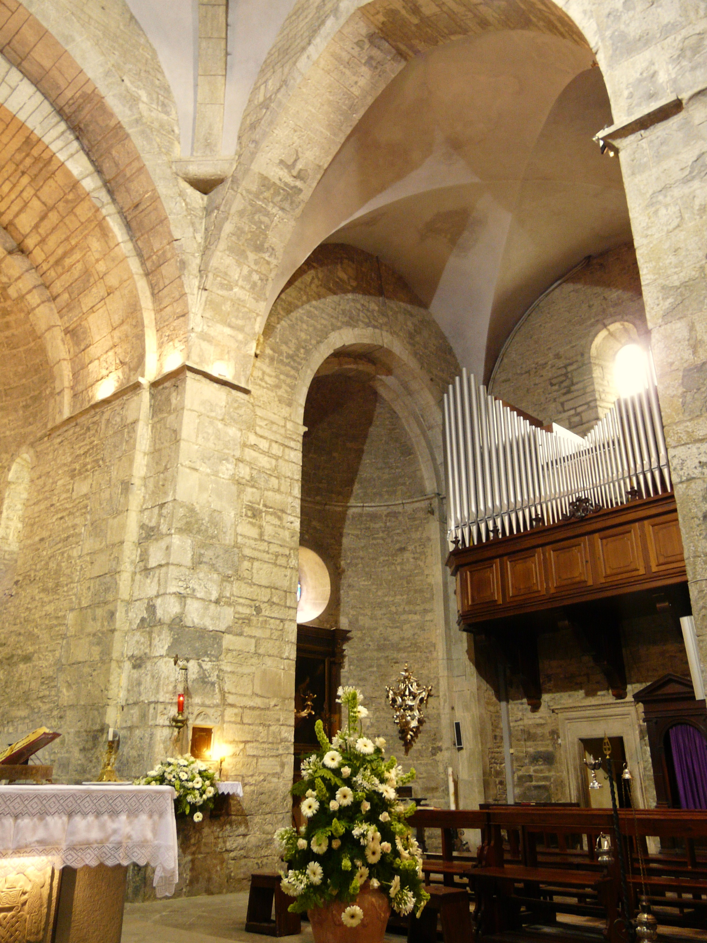 Duomo di Berceto, Emilia Romagna, Italia